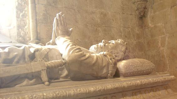 Tumulo de Camões, Mosteiro dos Jerónimos, Lisboa, Portugal. Março 2004.